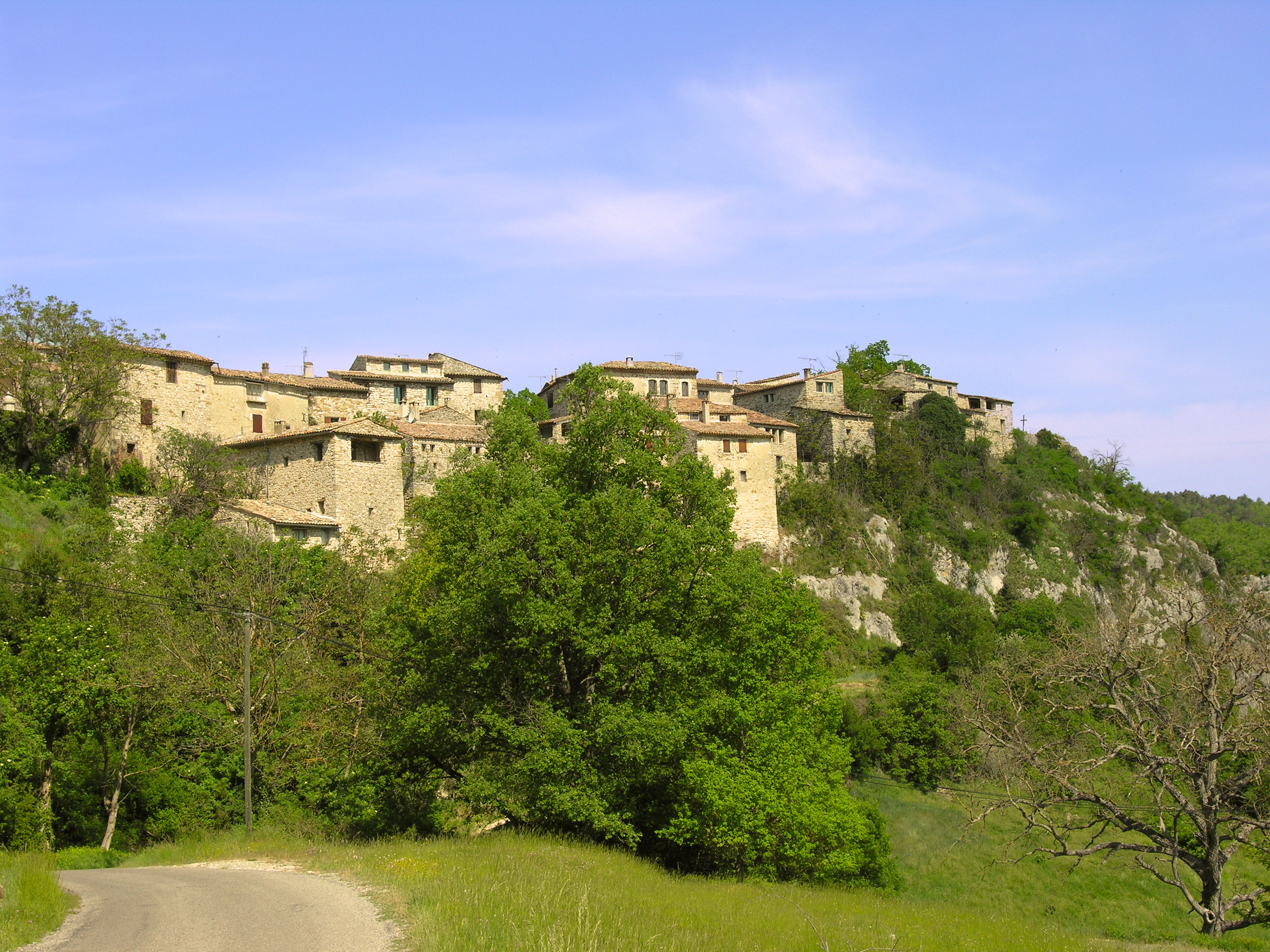 Village d'Oppedette